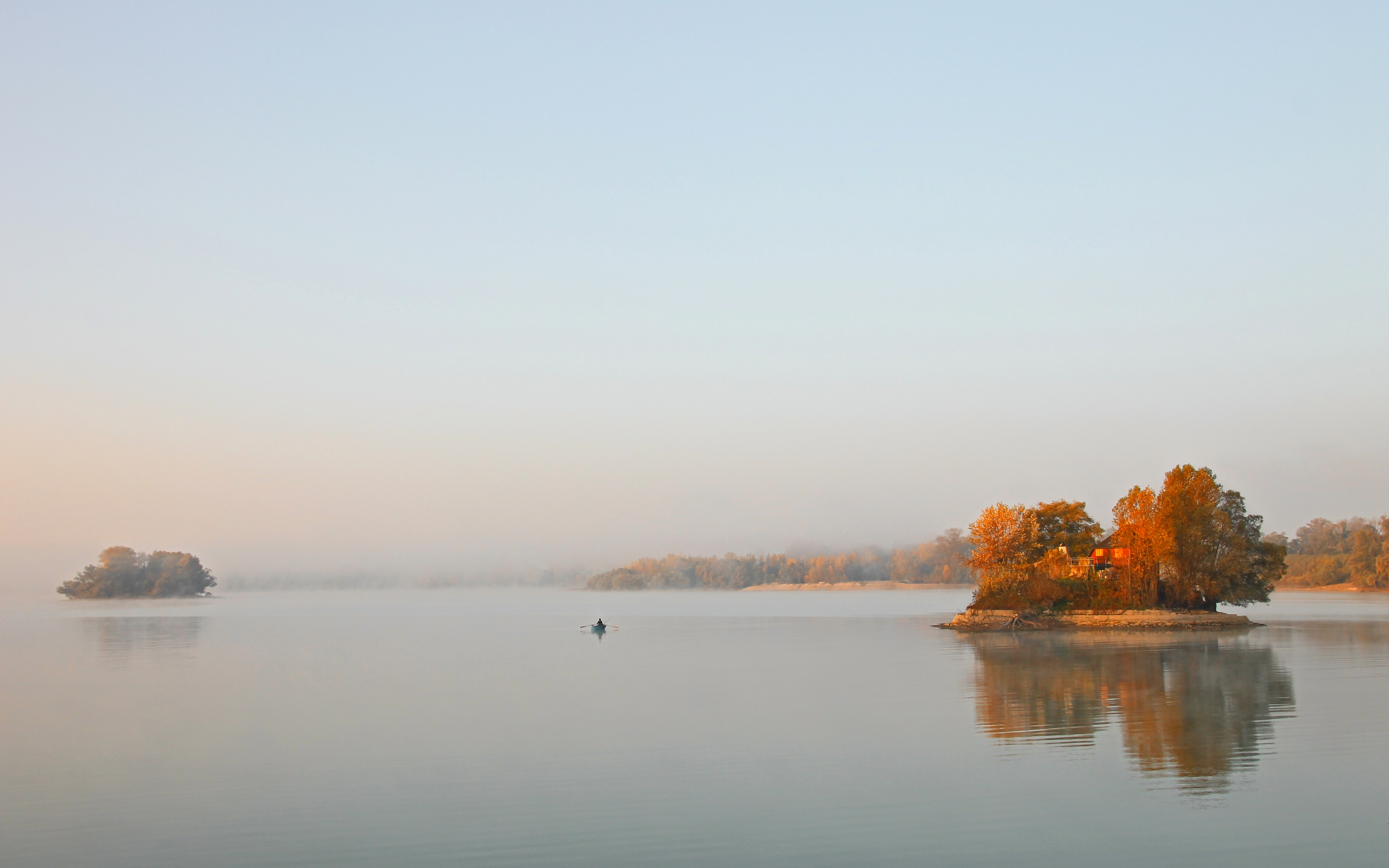 Blick auf den Goldkanal und seine beiden Inseln in Elchesheim-Illingen (Ortsteil Illingen) im Naturschutzgebiet Auer Köpfle-Illinger Altrhein-Motherner Wörth.